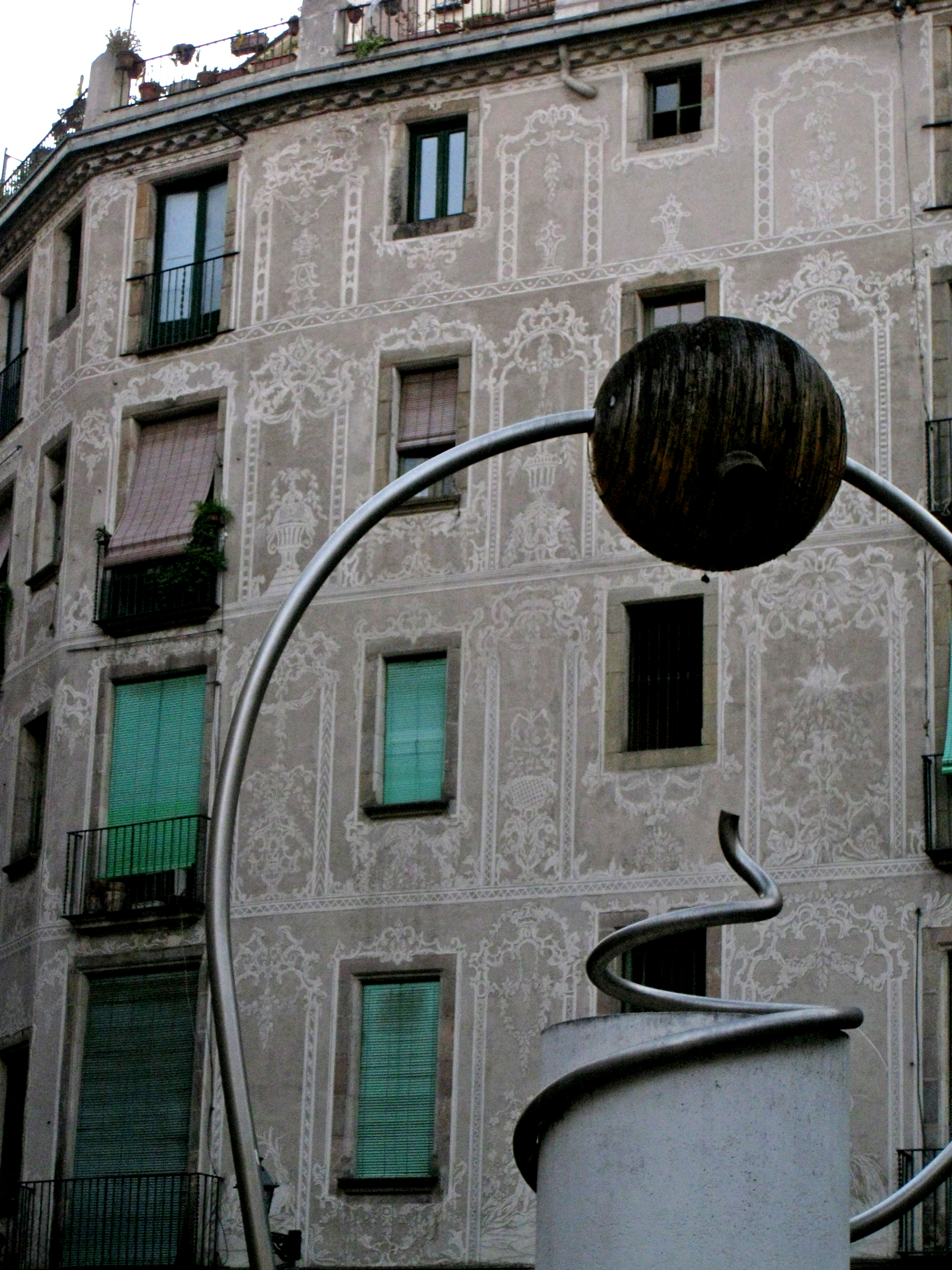 Plaça George Orwell, al barri Gòtic de Barcelona. Escultura surrealista de Leandre Cristòfol. Al fons, edifici del segle XVIII amb esgrafiats.